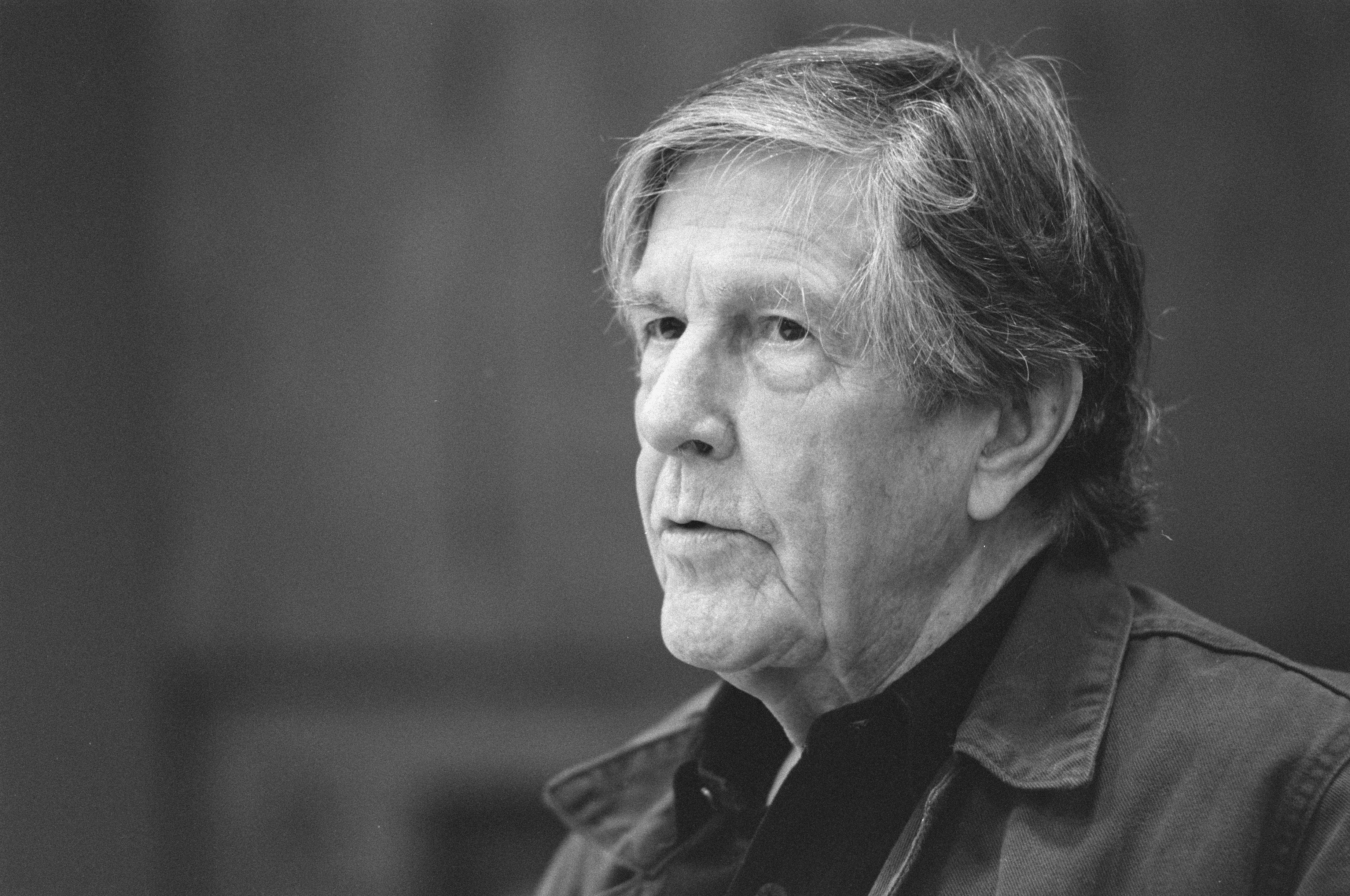 Collectie / Archief : Fotocollectie Anefo Reportage / Serie : [ onbekend ] Beschrijving : Componist John Cage , kop Datum : 16 november 1988 Trefwoorden : componisten Persoonsnaam : John Cage Fotograaf : Croes, Rob C. / Anefo Auteursrechthebbende : Nationaal Archief Materiaalsoort : Negatief (zwart/wit) Nummer archiefinventaris : bekijk toegang 2.24.01.05 Bestanddeelnummer : 934-3585